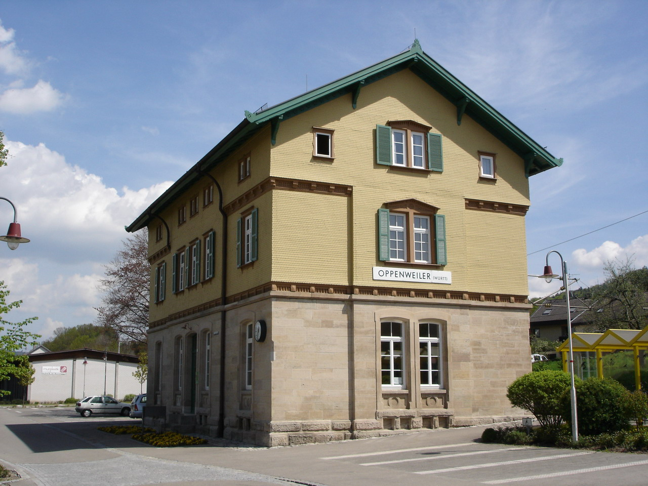 Murrbahn. Bahnhof Oppenweiler, Baden-Württemberg, Deutschland. Sonstiges